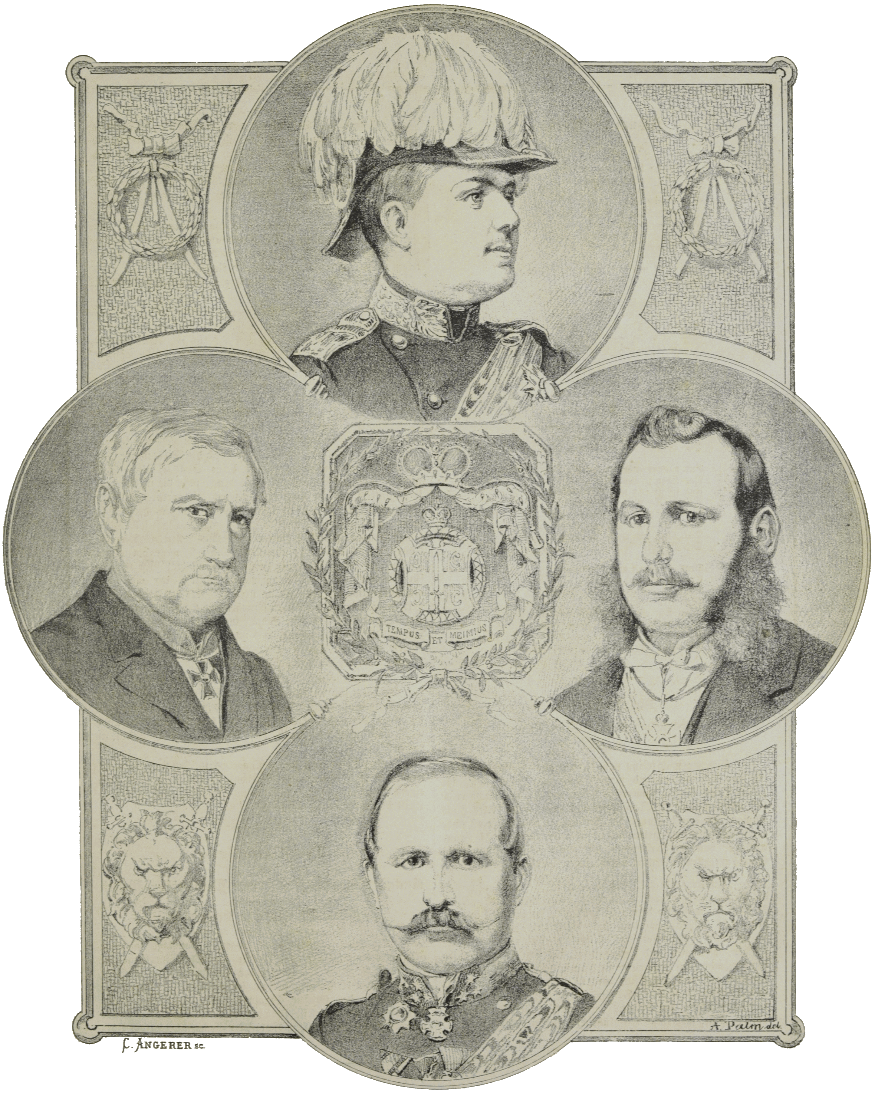 Fürst Milan und die frühe Regentschaft Milan Obrenović (Милан Обреновић; 1854–1901), Serbian king Jovan Gavrilović (Јован Гавриловић; 1796–1877), Serbian historian and politician Jovan Ristić (Јован Ристић; 1831–1899), Serbian diplomat and politician Milivoje Petrović Blaznavac (Миливоје Петровић Блазнавац; 1824–1873), Serbian general and politician